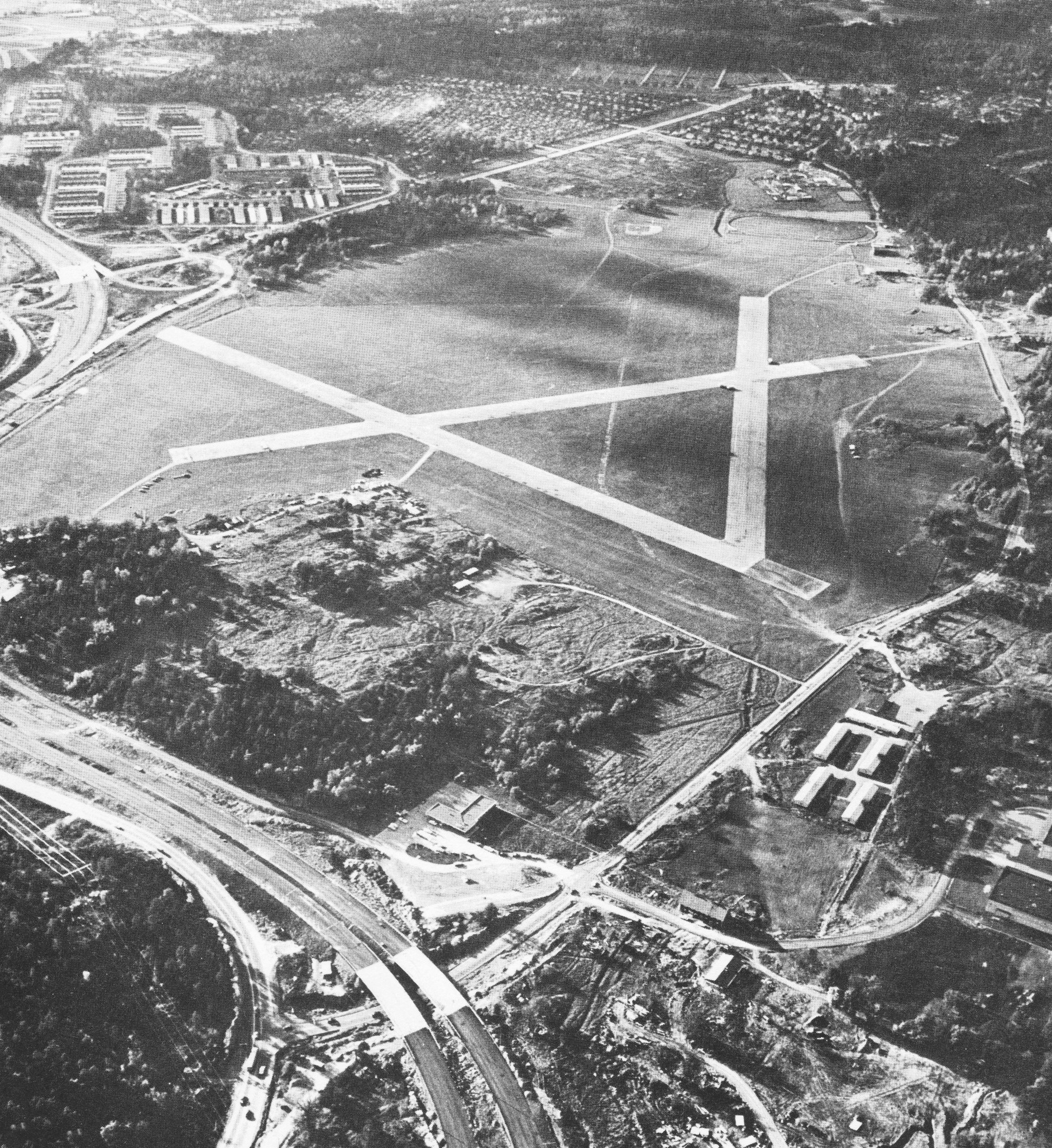 Skarpnäksfältet 1967, i föregrunden pågår anläggningsarbetena med Tyresövägen